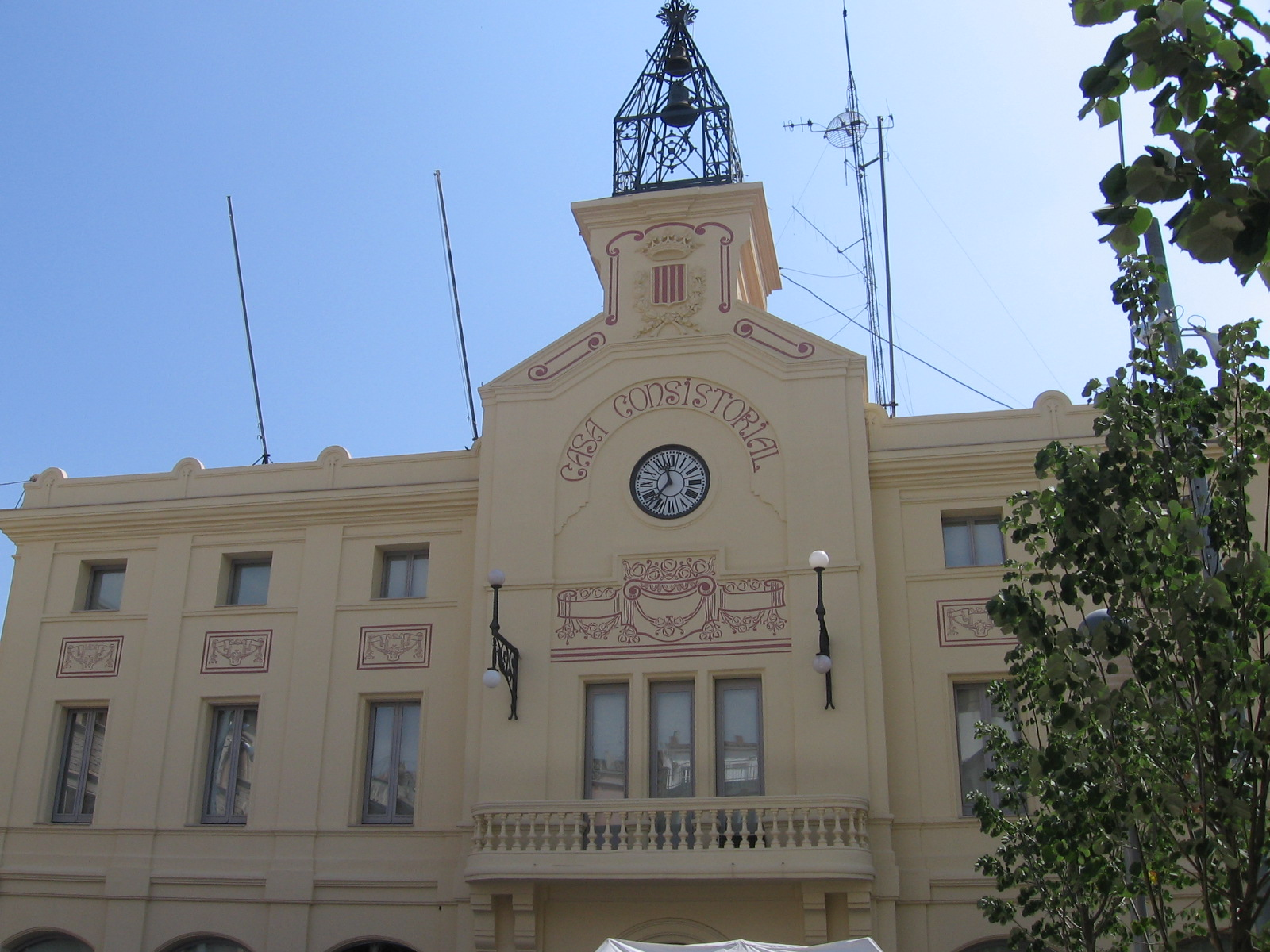 Ayuntamiento